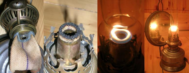 Kosmosbrenner einer Ditmar Küchenlampe. ca. 1940. Eigenes Foto